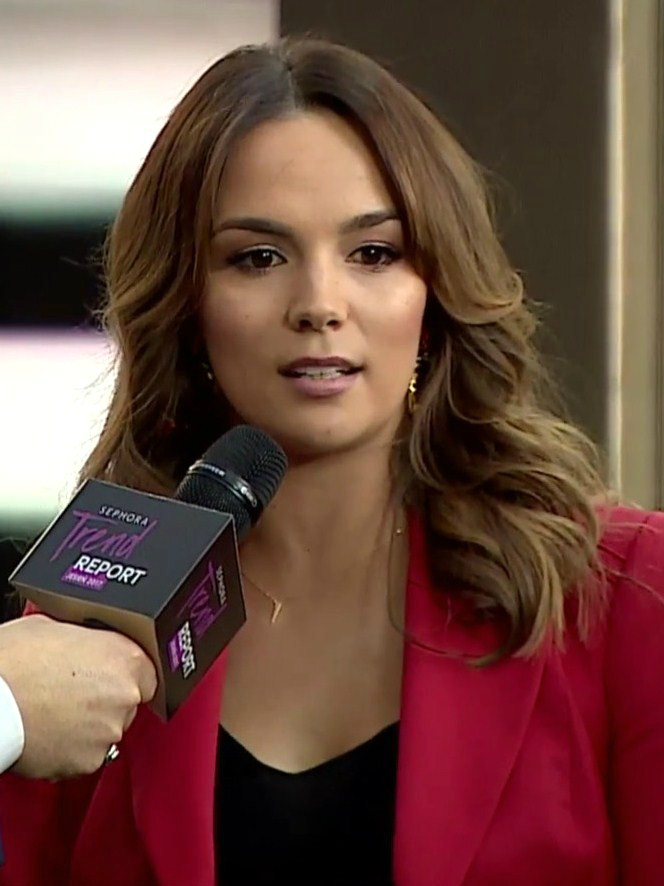 Paulina Krupińska, modelka i prezenterka telewizyjna, Miss Polonia 2012.